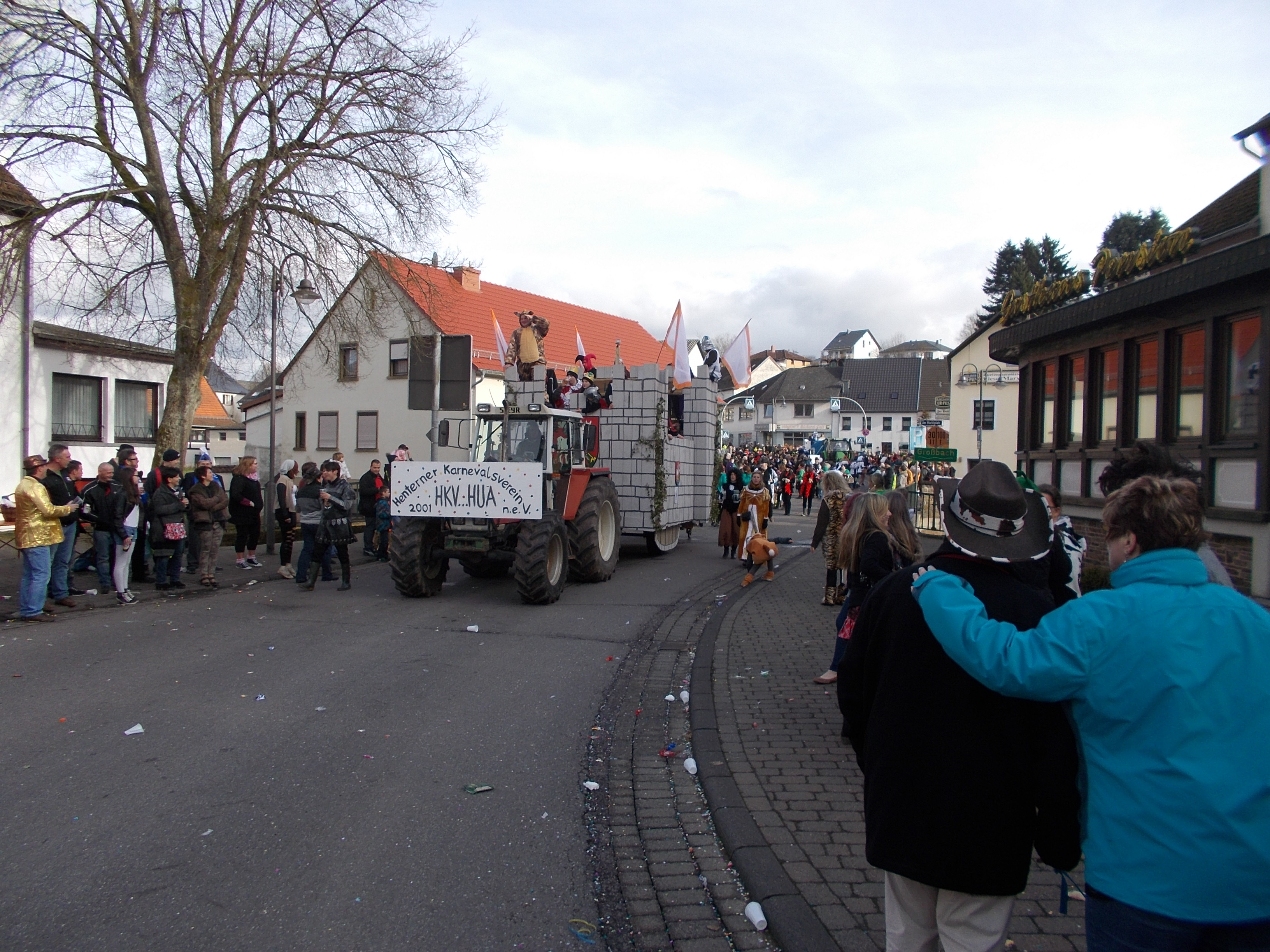 Karneval in Zerf, VG Kell am See, Landkreis Trier-Saarburg (vorne der Wagen des HKV)